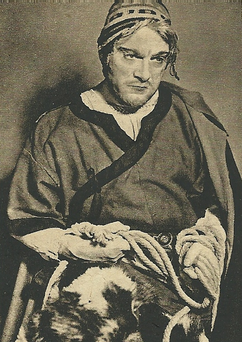 Memo Benassi nella Figlia di Jorio